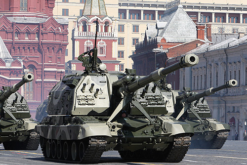 МОСКВА. Военный парад в честь 64-й годовщины Победы в Великой Отечественной войне. По Красной площади прошли самоходные гаубицы «Мста».